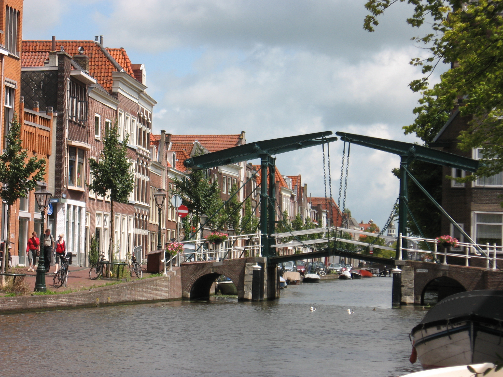 Kerkbrug Leiden